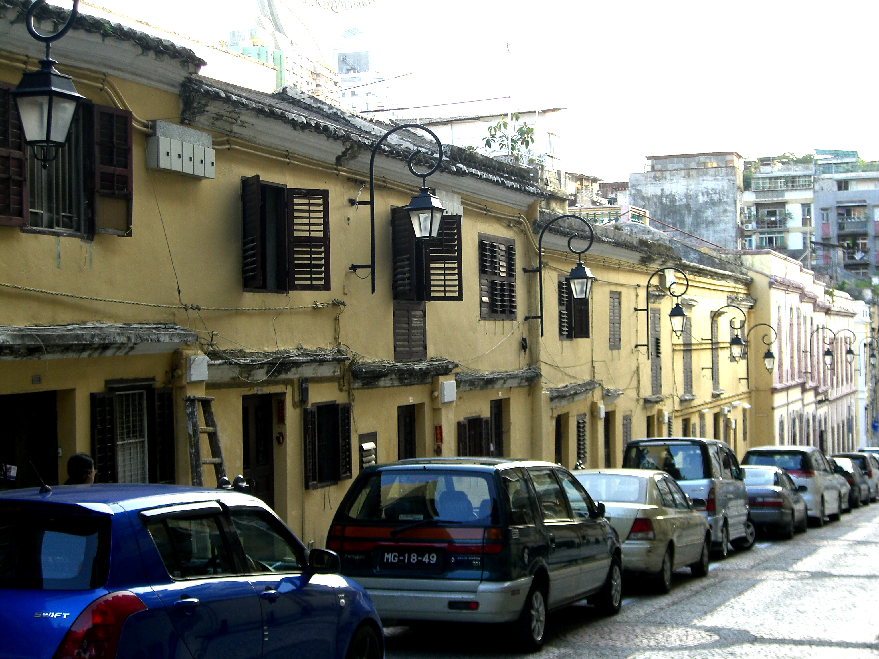 Rua De Eduardo Marques